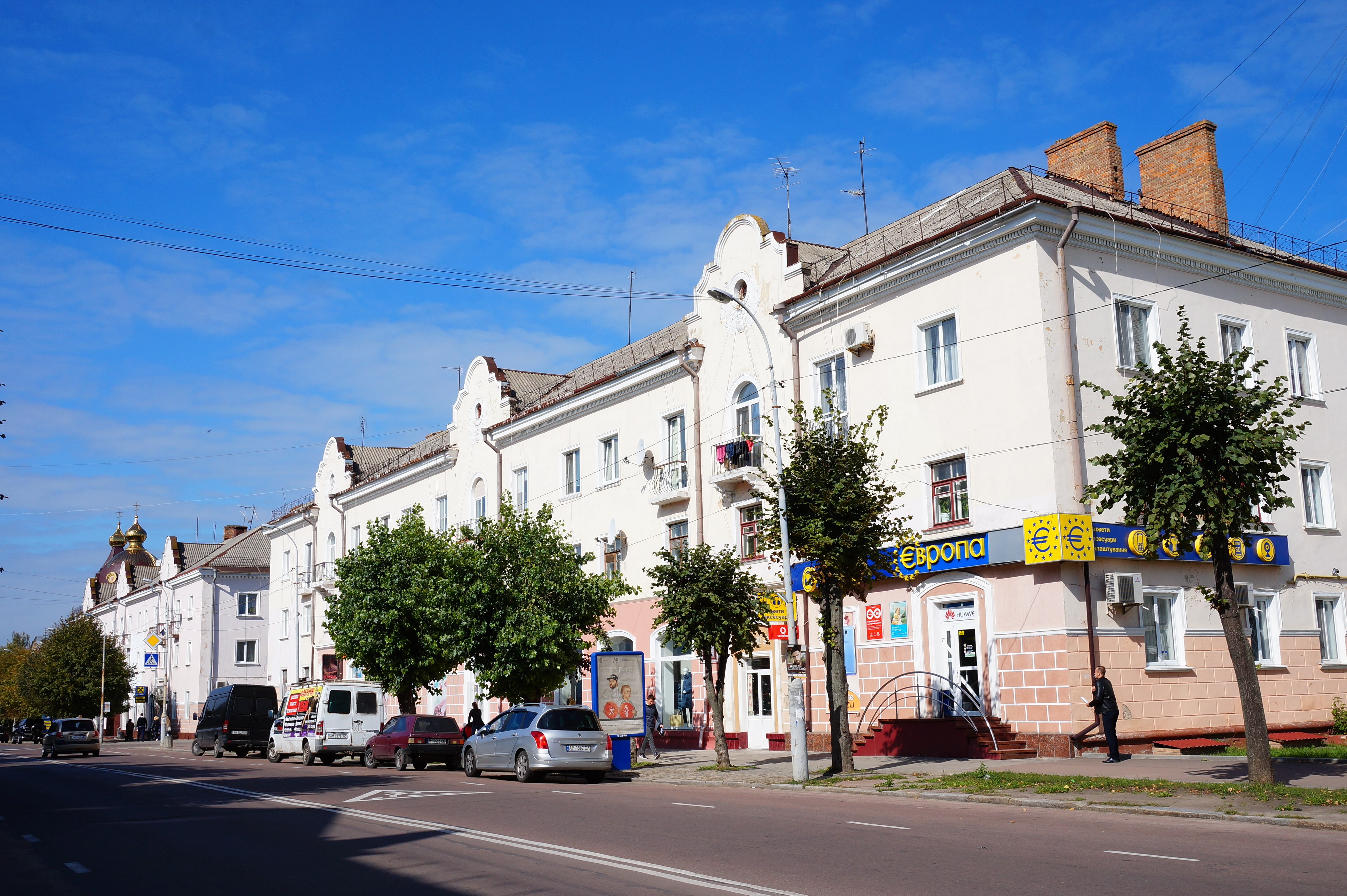 Житлові будинок, Бердичів, вул. Європейська, 11, 13 (колишня вул. К. Лібкнехта, 11, 13)